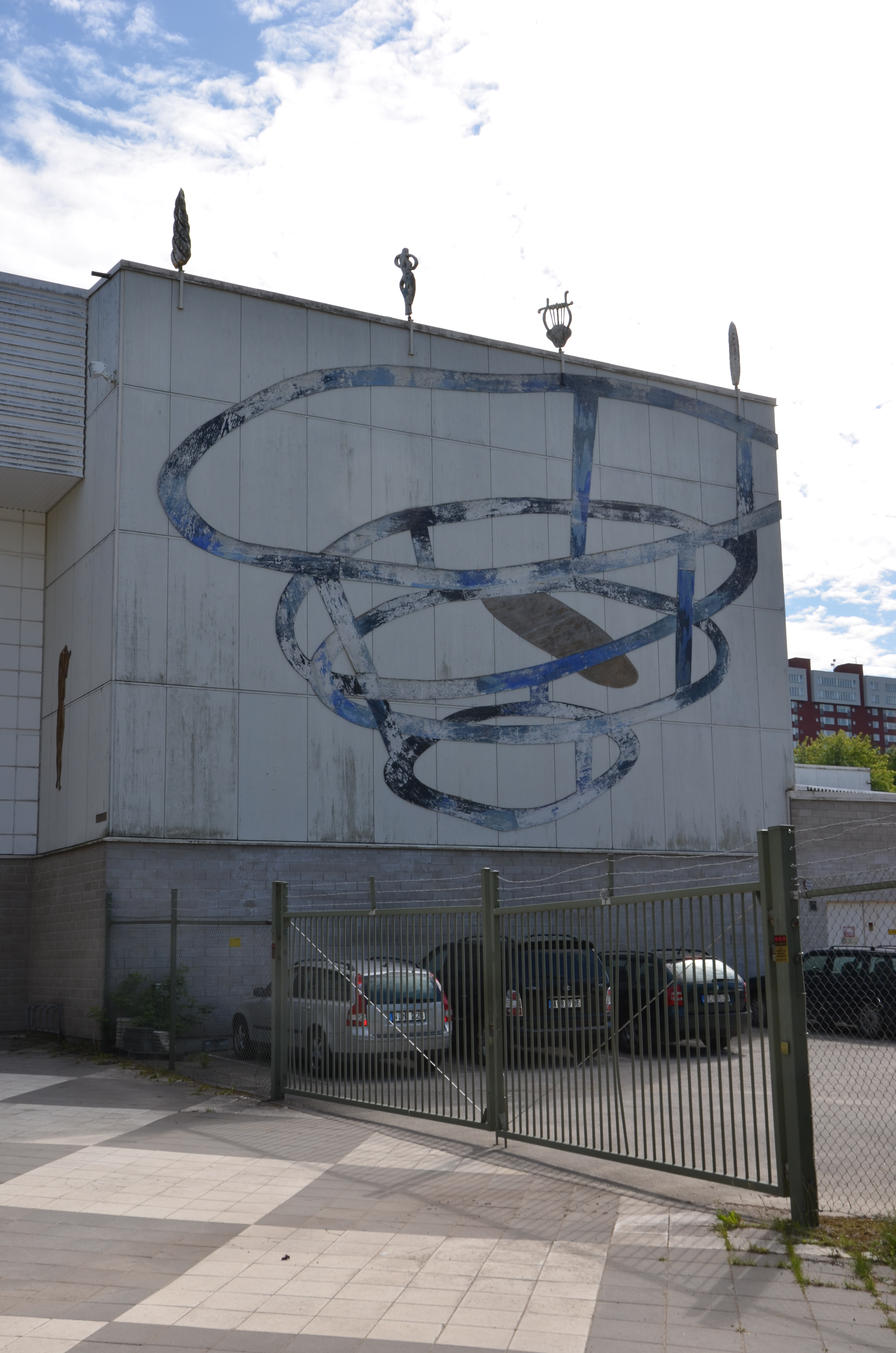 Fasadutsmyckning på Riksteatern i Hallunda, 1990, av Maria Backman